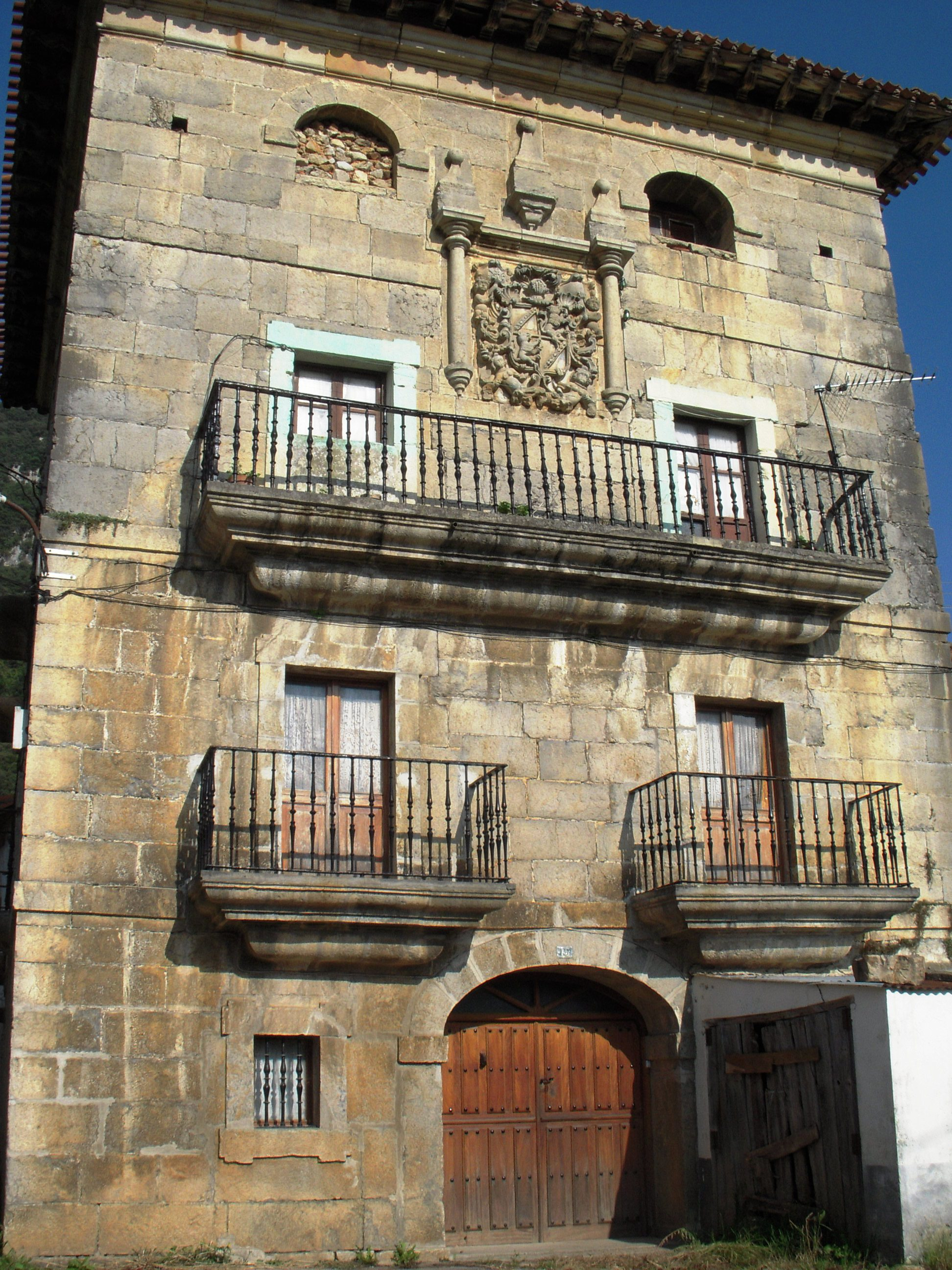 Hoz de Marrón